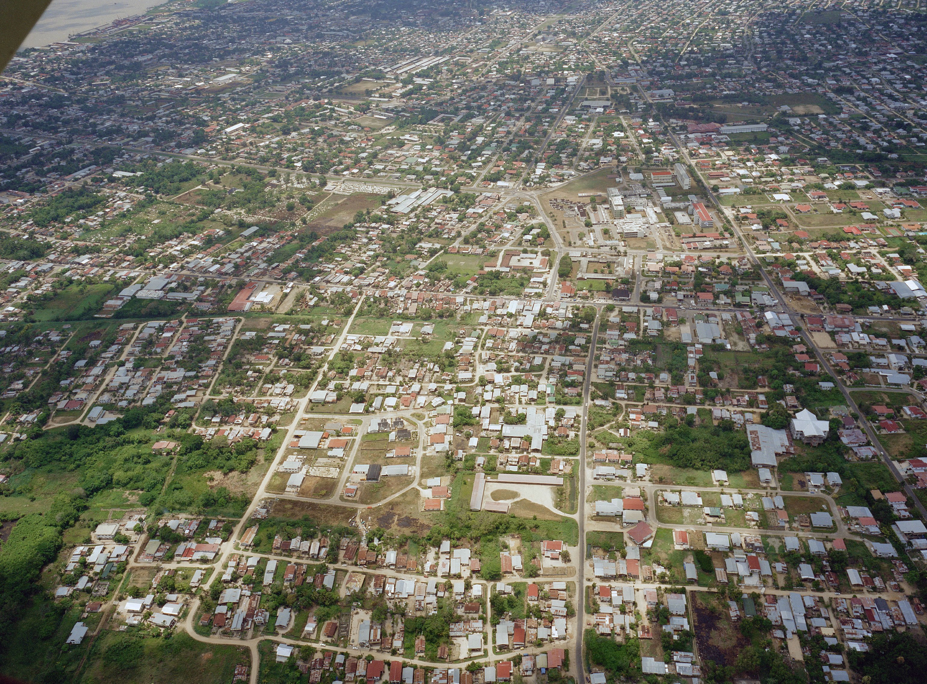 Koloniale geschiedenis/ Luchtfoto: Overzicht van uit de lucht van Paramaribo (opmerking: Suriname reis Loek Tangel)